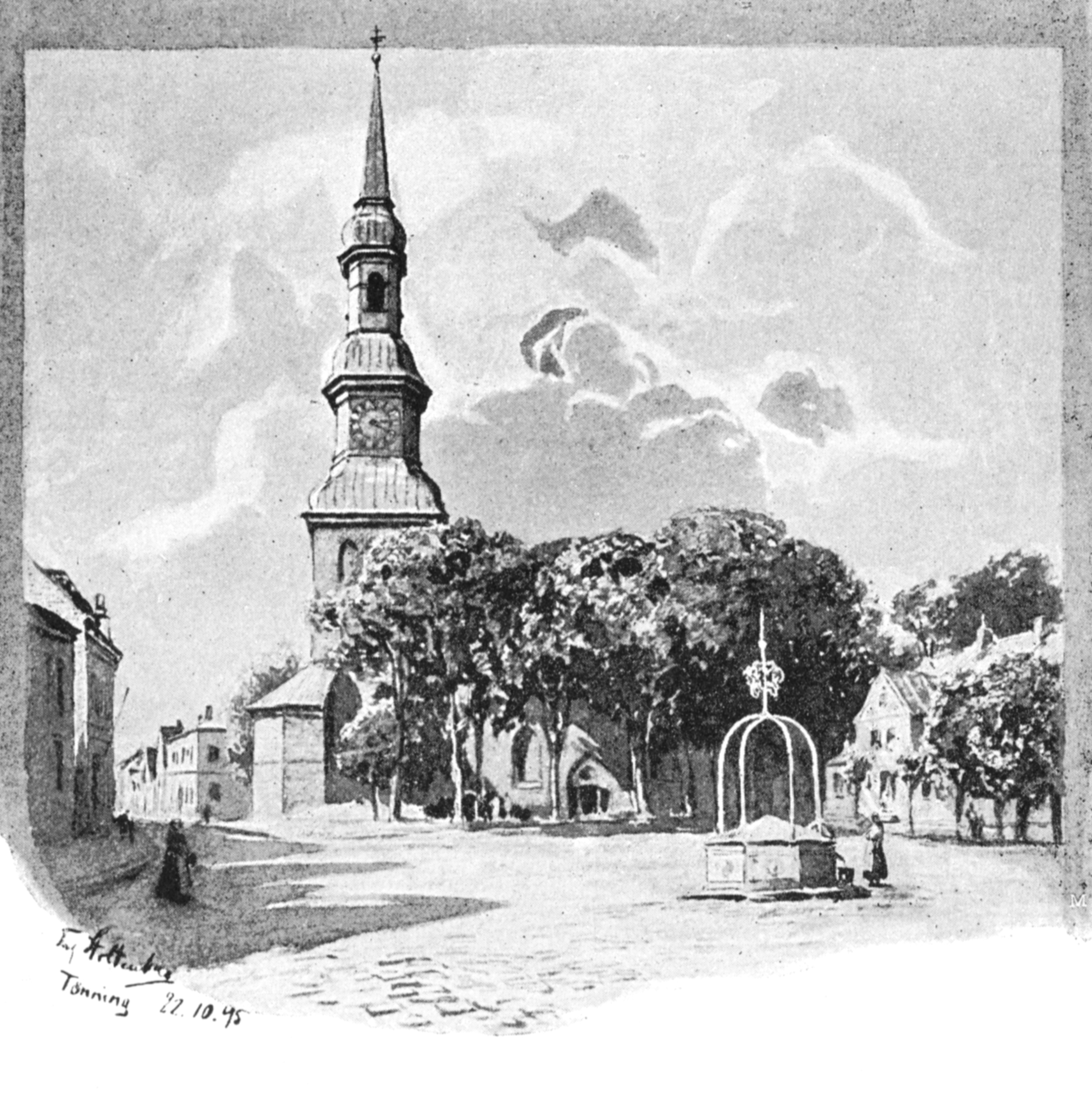 Der Marktplatz von Tönning mit der St. Laurentius-Kirche, Zeichnung von Fritz Stoltenberg